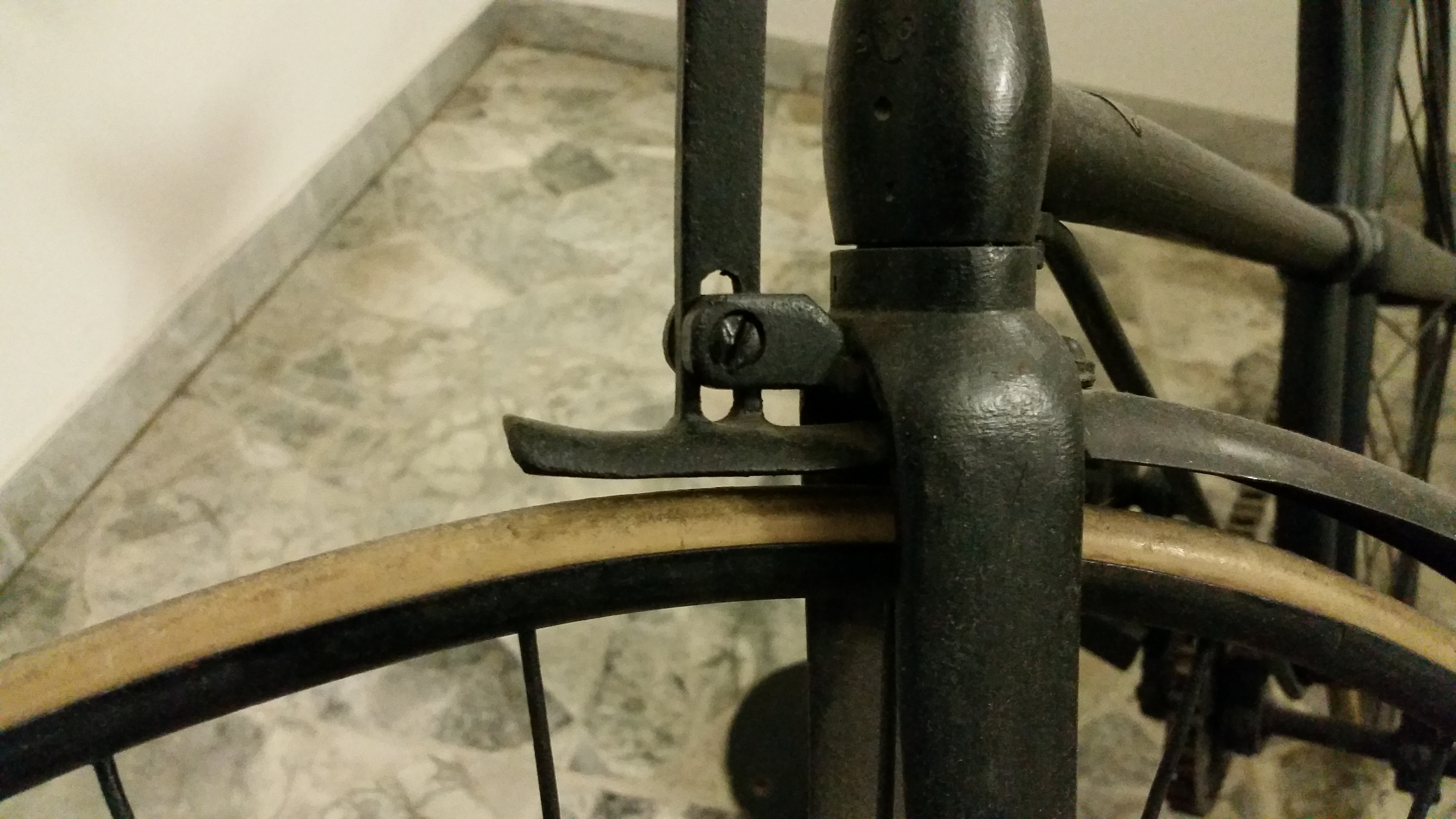 Adler Kreuzrahmenrad von 1886, ausgestellt bei Firma Busch und Müller in Meinerzhagen. Erstes deutsches Niederrad in Serie, hergestellt von Heinrich Kleyer in Frankfurt. Detailansicht des Vorderrads mit Holzreifen und Stempelbremse.